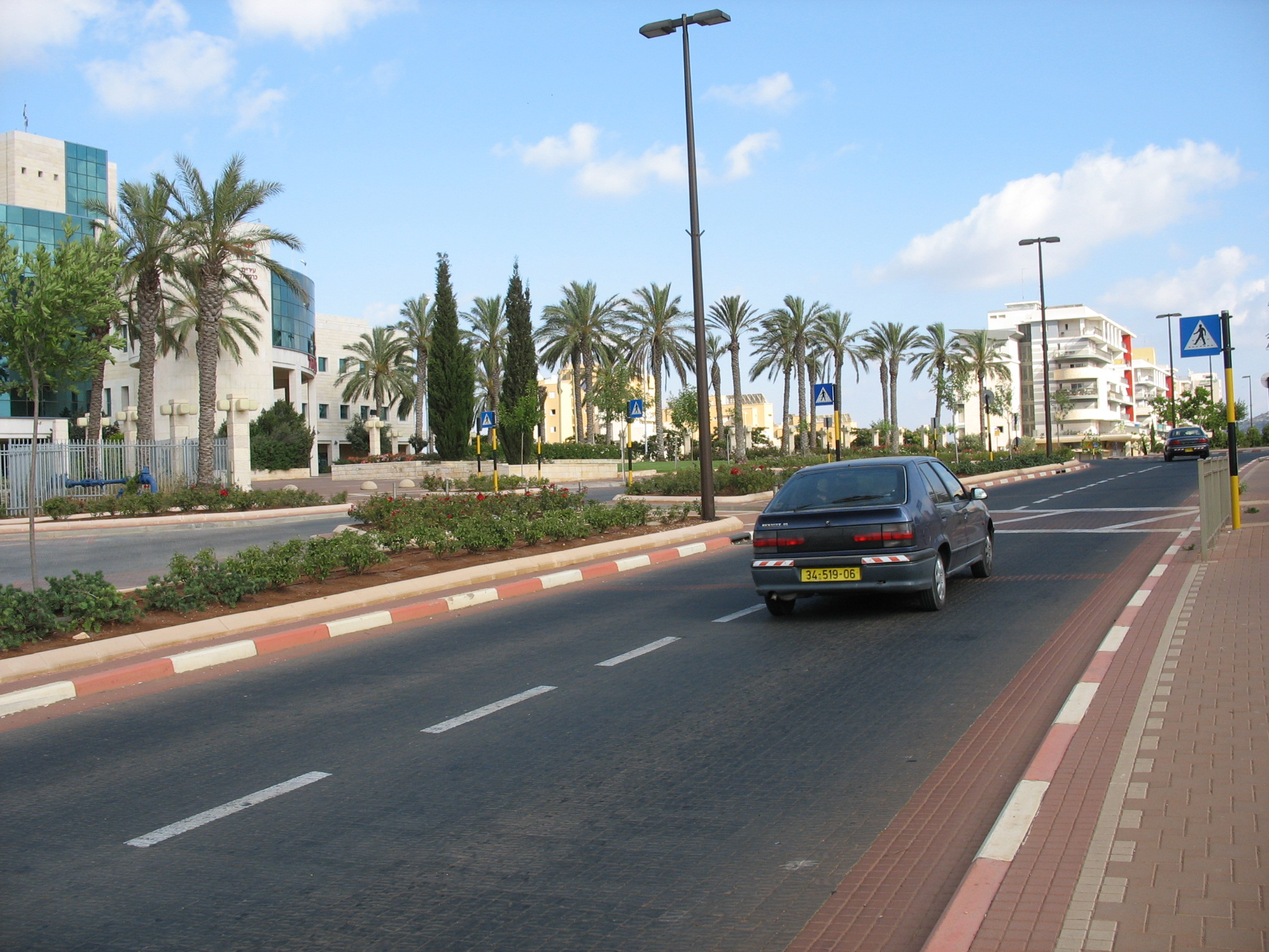 שד' קקל כרמיאל